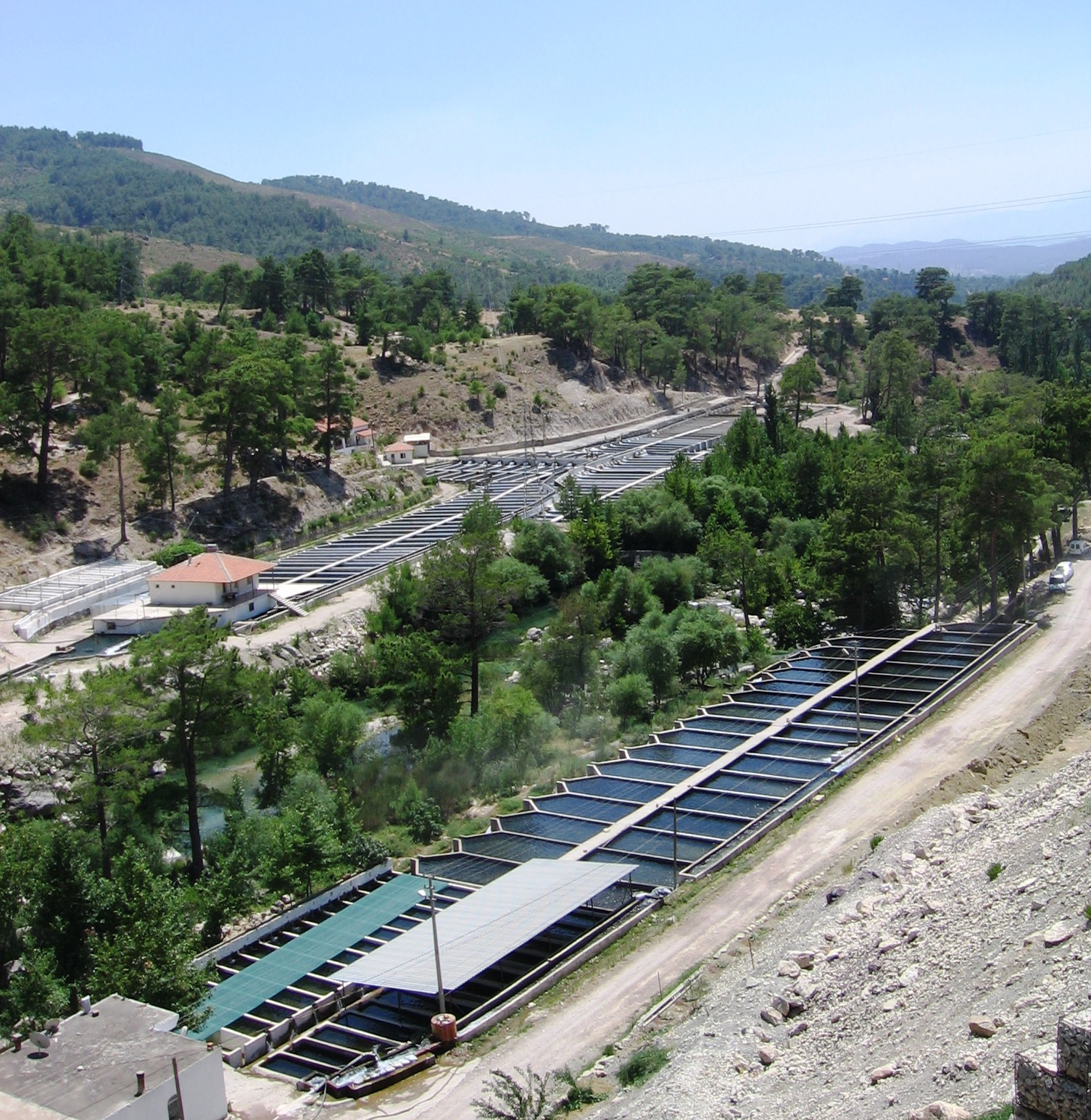 Fish farm مزرعة أسماك